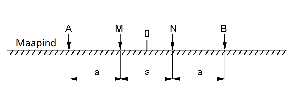 Wenner'i elektroodkonfiguratsioon